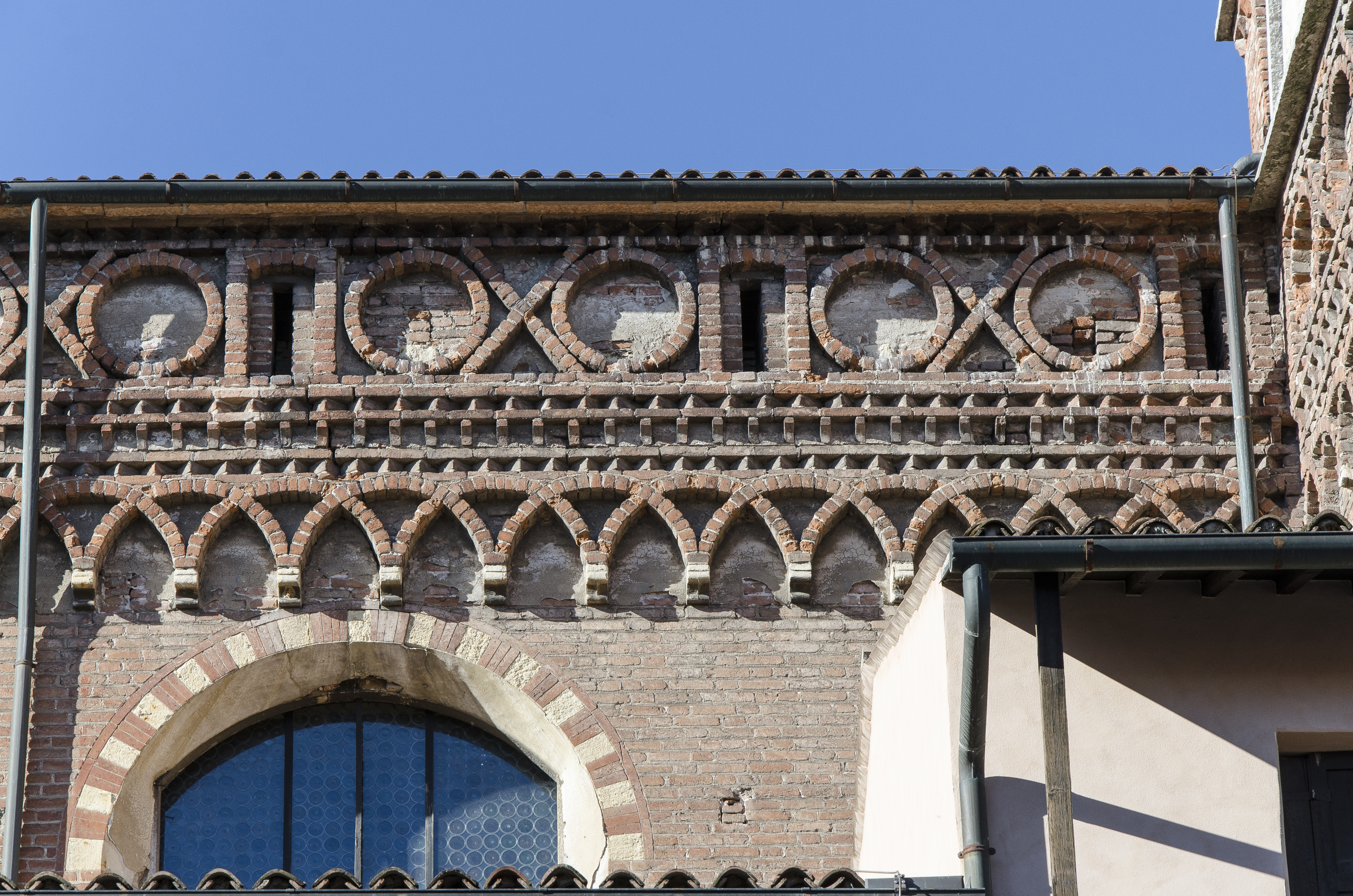 Fotografia dell'esterno